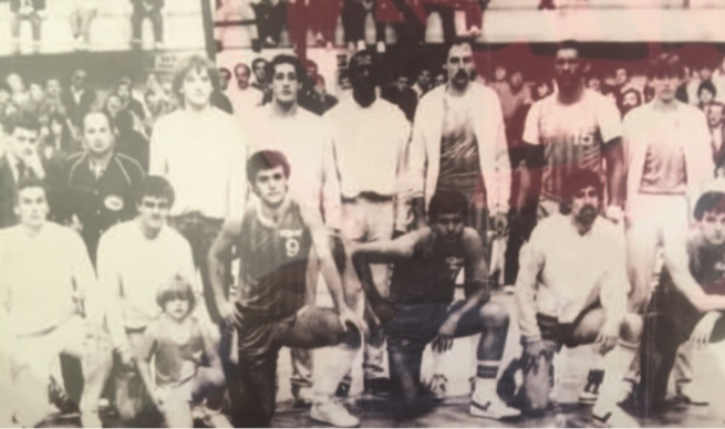 Foto del equipo de Estudiantes Concordia que logró el ascenso a la Liga Nacional de Básquet en 1986 al ganar la segunda división.